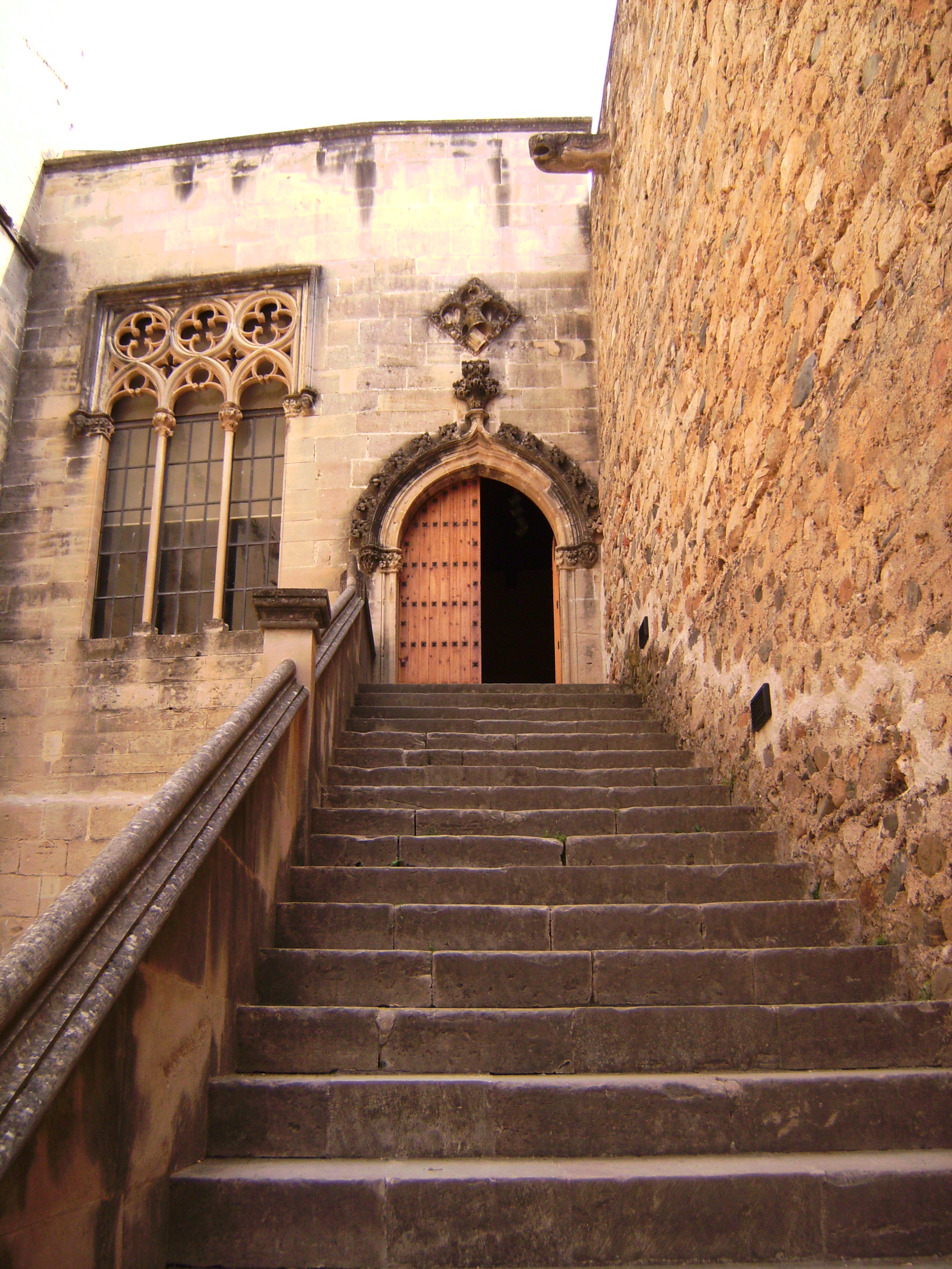 Real Monasterio de Santa Maria de Poblet - Escalera de Entrada al Museo